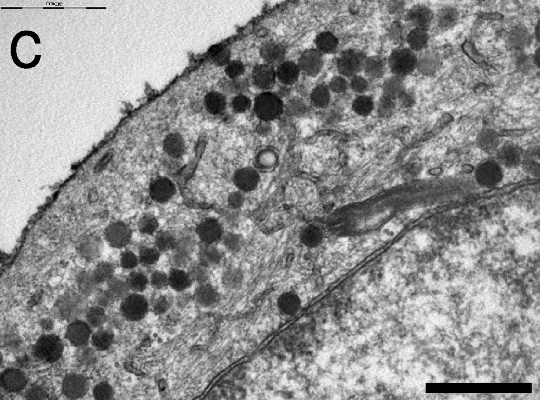 Figura 3. El análisis por microscopía electrónica confirmó la identidad de las células de Merkel. Análisis ultraestructurales (c) La membrana delgada distinguible alrededor de los gránulos citoplasmáticos más oscuros es consistente con las células neuroendocrinas. Barra de escala, 500 nm.